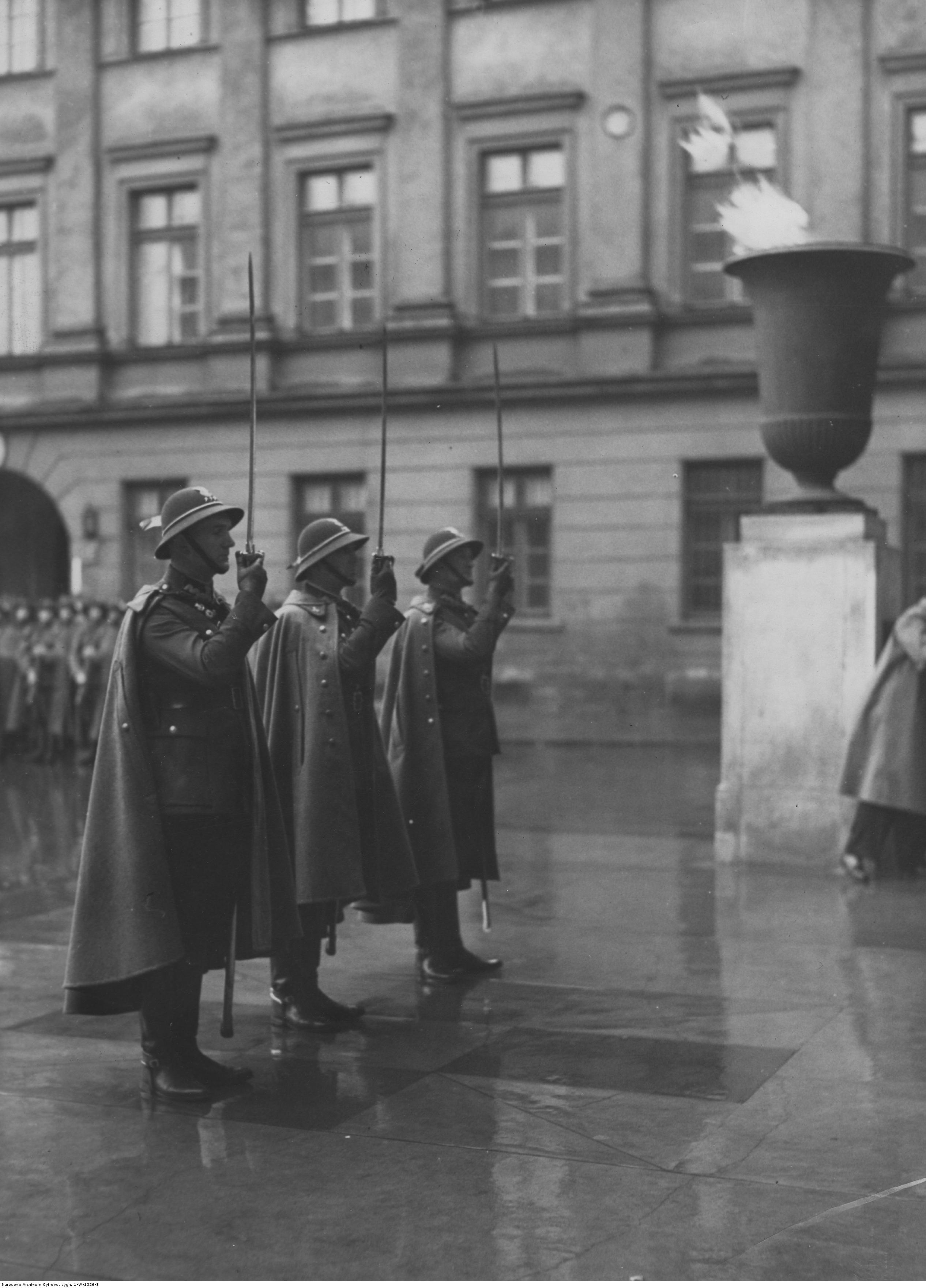 Wizyta kompanii szlachty podkarpackiej 5 Pułku Strzelców Podhalańskich w Warszawie. Trzej strzelcy podhalańscy salutują szablami przed Grobem Nieznanego Żołnierza. Koncern Ilustrowany Kurier Codzienny - Archiwum Ilustracji. Sygnatura: 1-W-1326-3